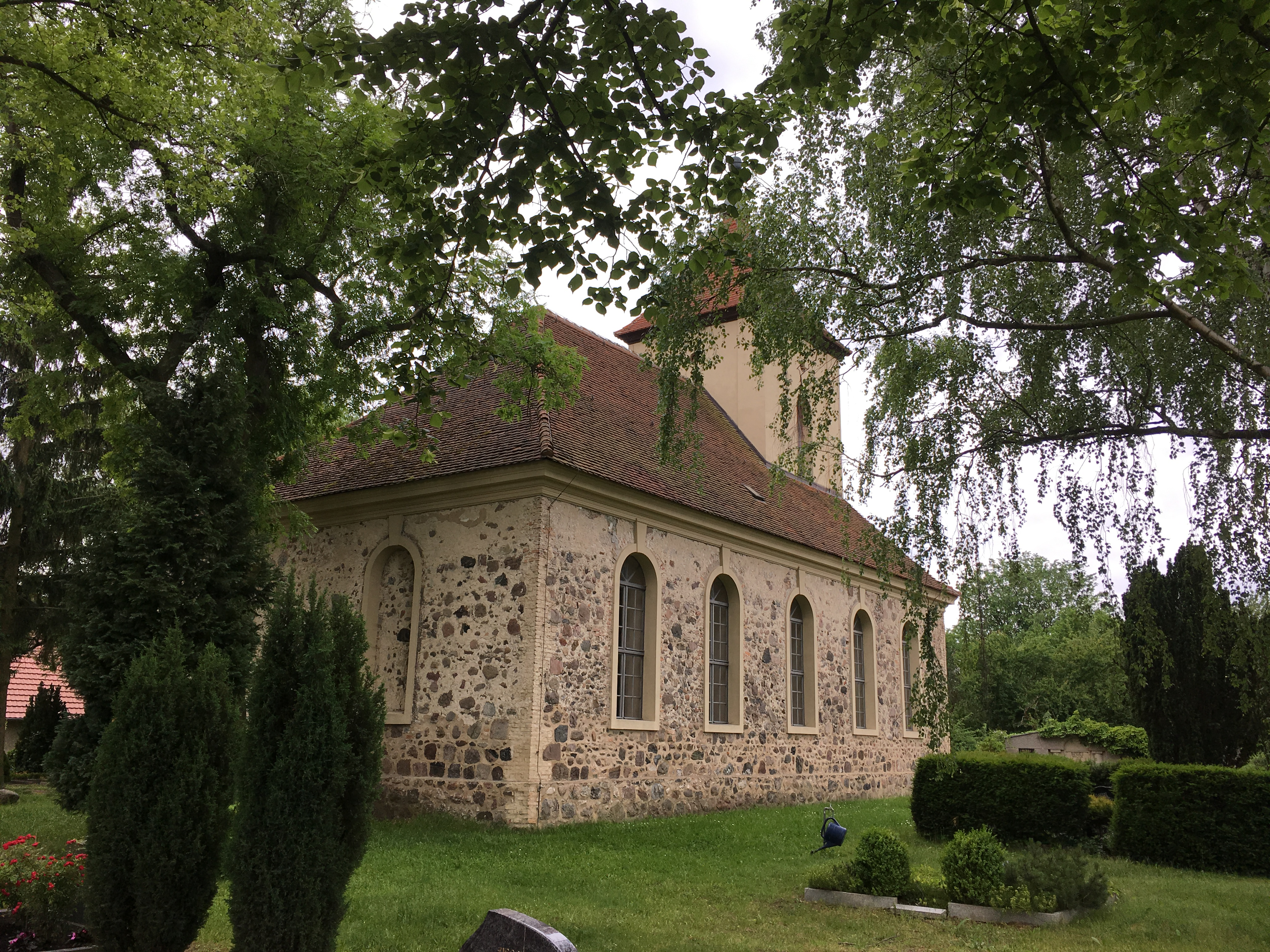 Die Dorfkirche Langerwisch ist eine spätbarocke Feldsteinkirche in Langerwisch, einem Ortsteil von Michendorf im Landkreis Potsdam-Mittelmark. Die Ausstattung wurde in den Jahren 1956 und 1957 vom Architekten Winfried Wendland umgestaltet.